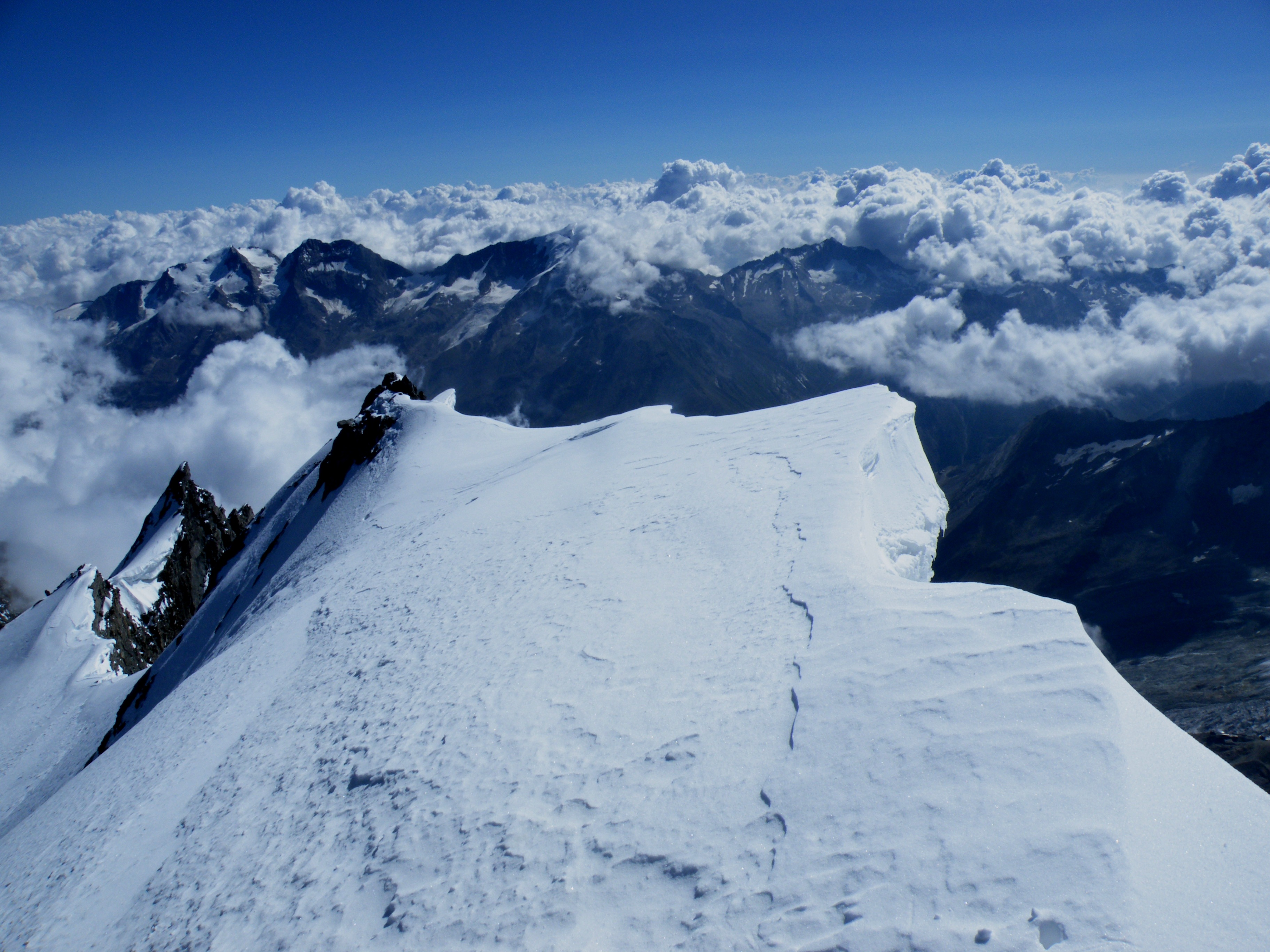 Auf dem Gipfel des Dom (4545 m).